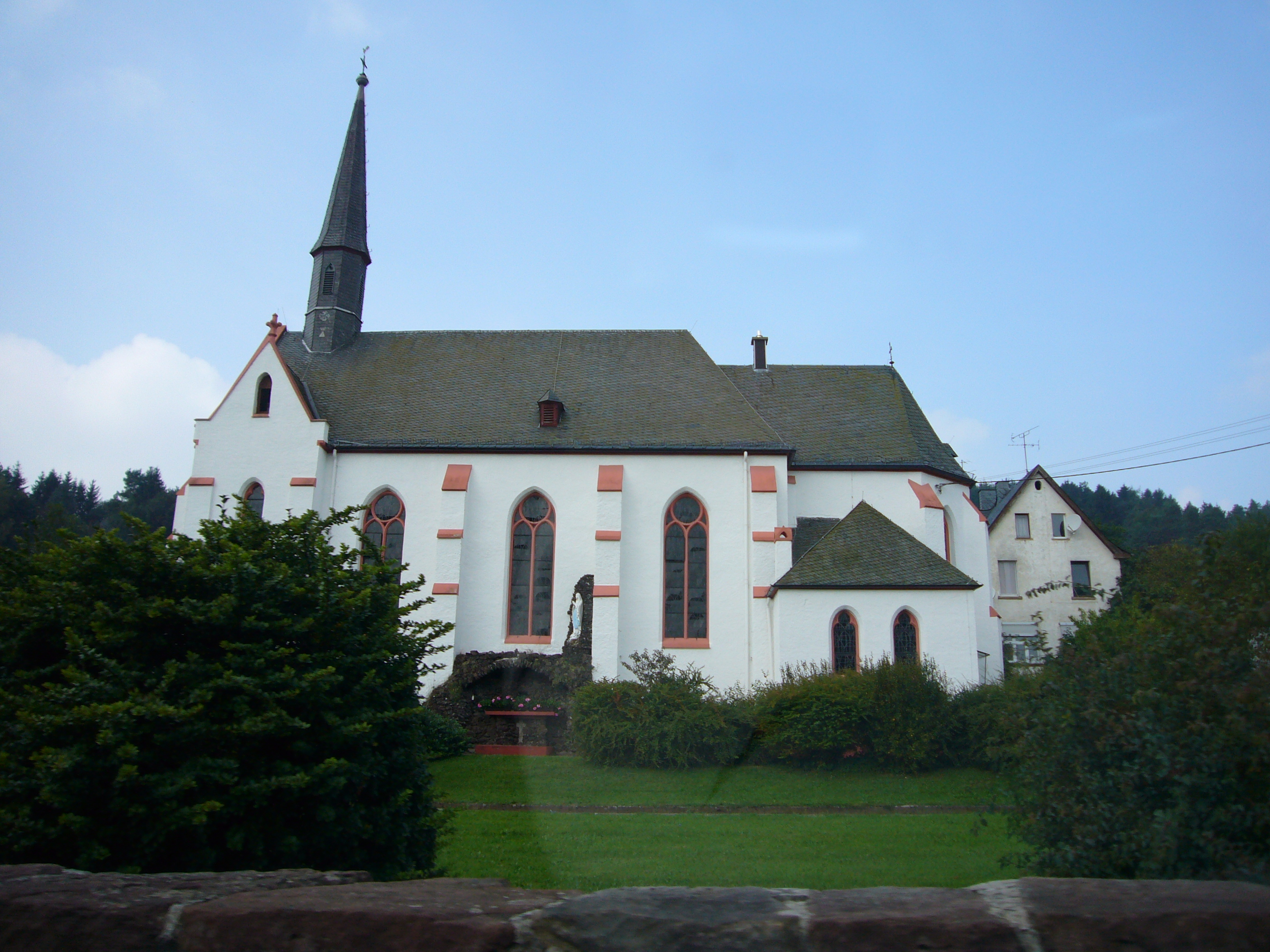 katholische Pfarrkirche St. Simon und Juda in Deudesfeld